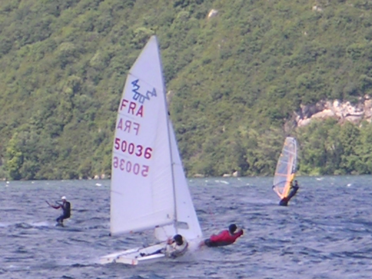 420 sur le lac du bourget (CNVA)